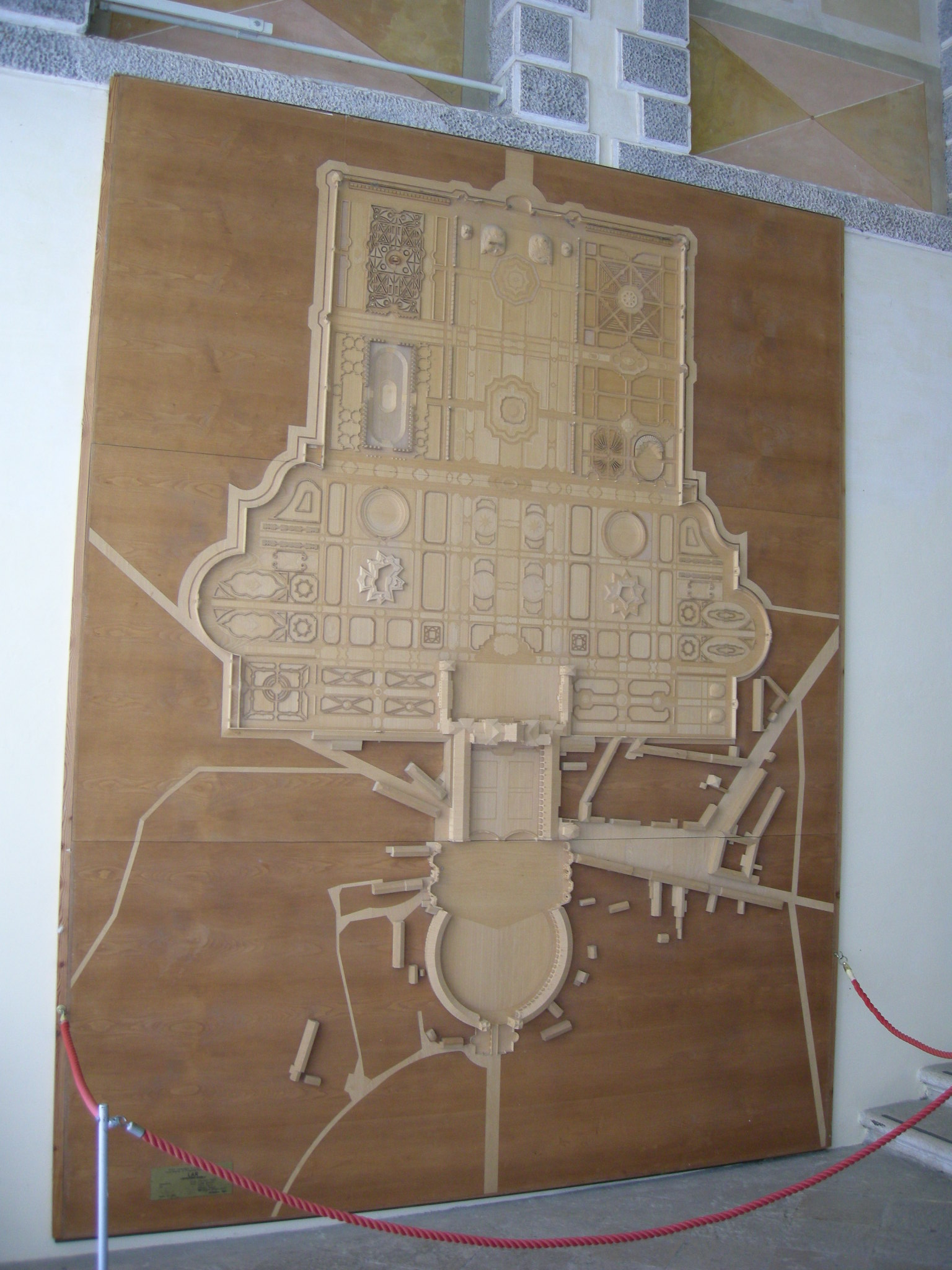 Villa manin, pianta